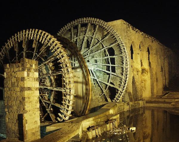 Hama wheels